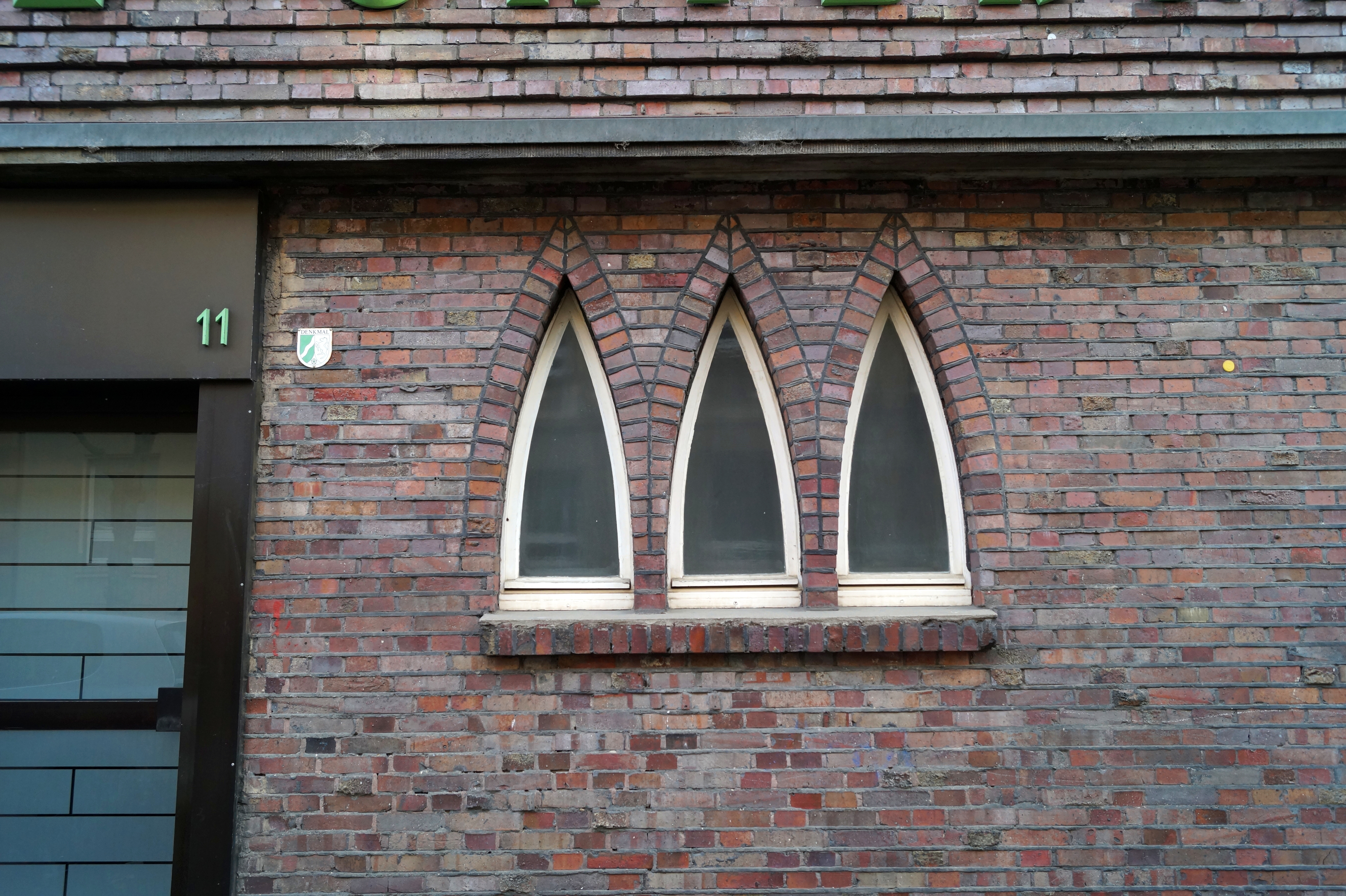 Herne-Wanne Märkische Straße 11, Fenster